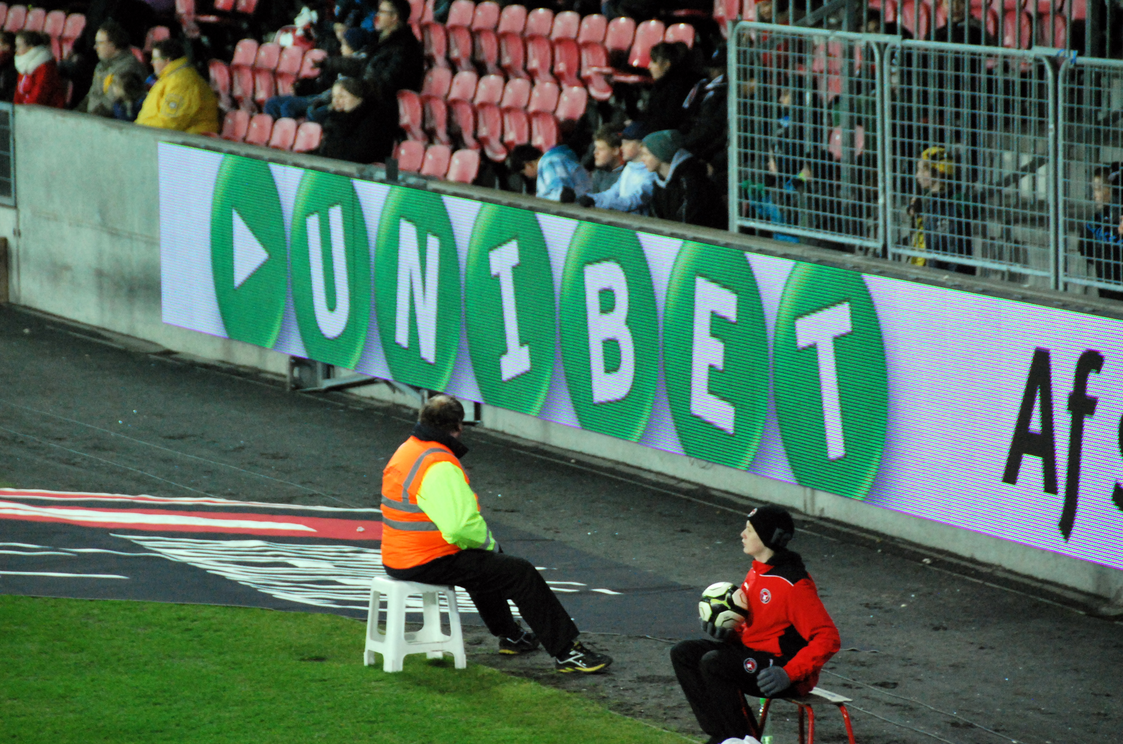 Kontrollør og bolddreng på MCH Arena i Herning. Her ved superligakamp imellem FC Midtjylland og AC Horsens.